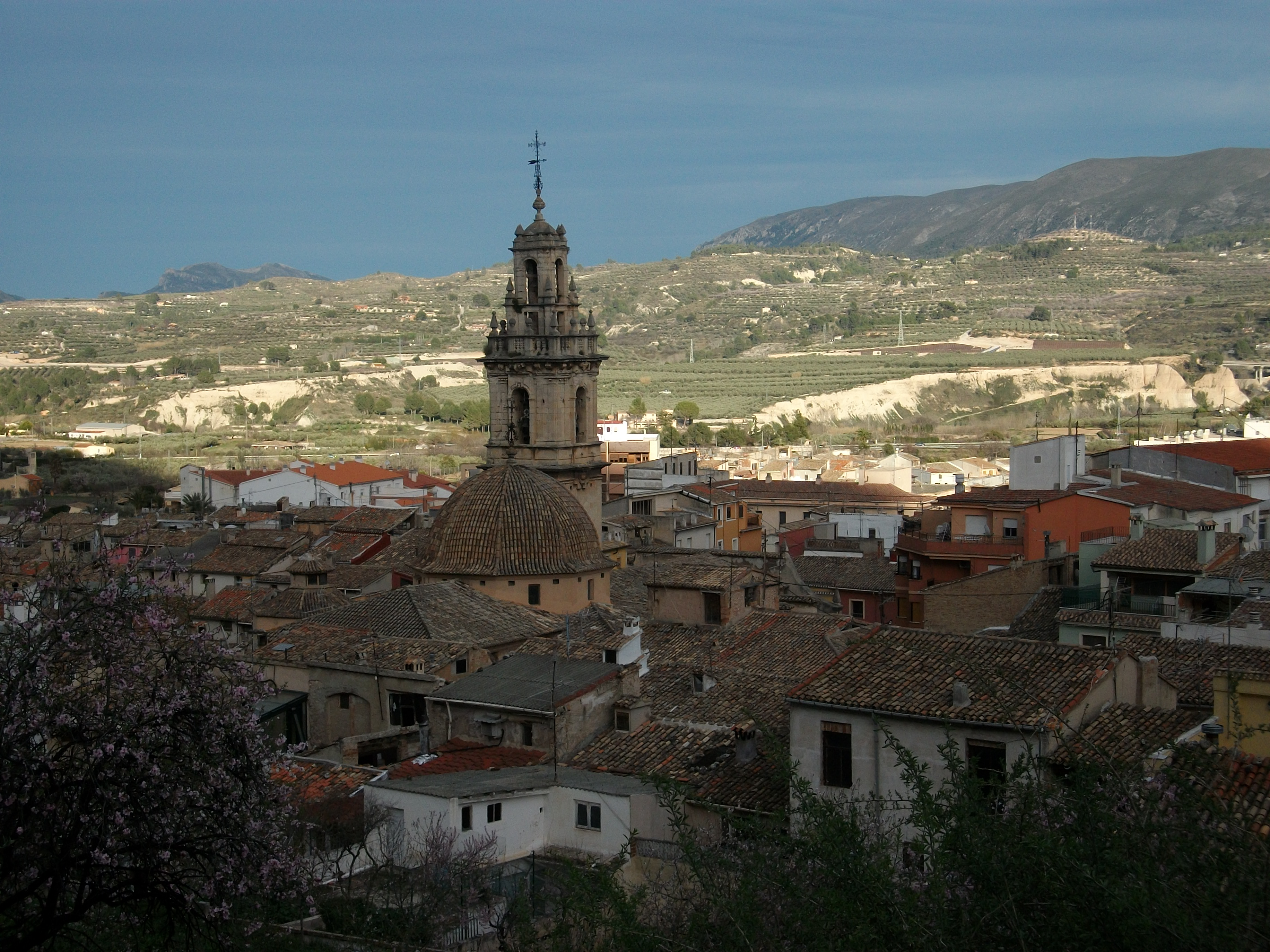 Vista de Cocentaina, el Comtat, País Valencià.